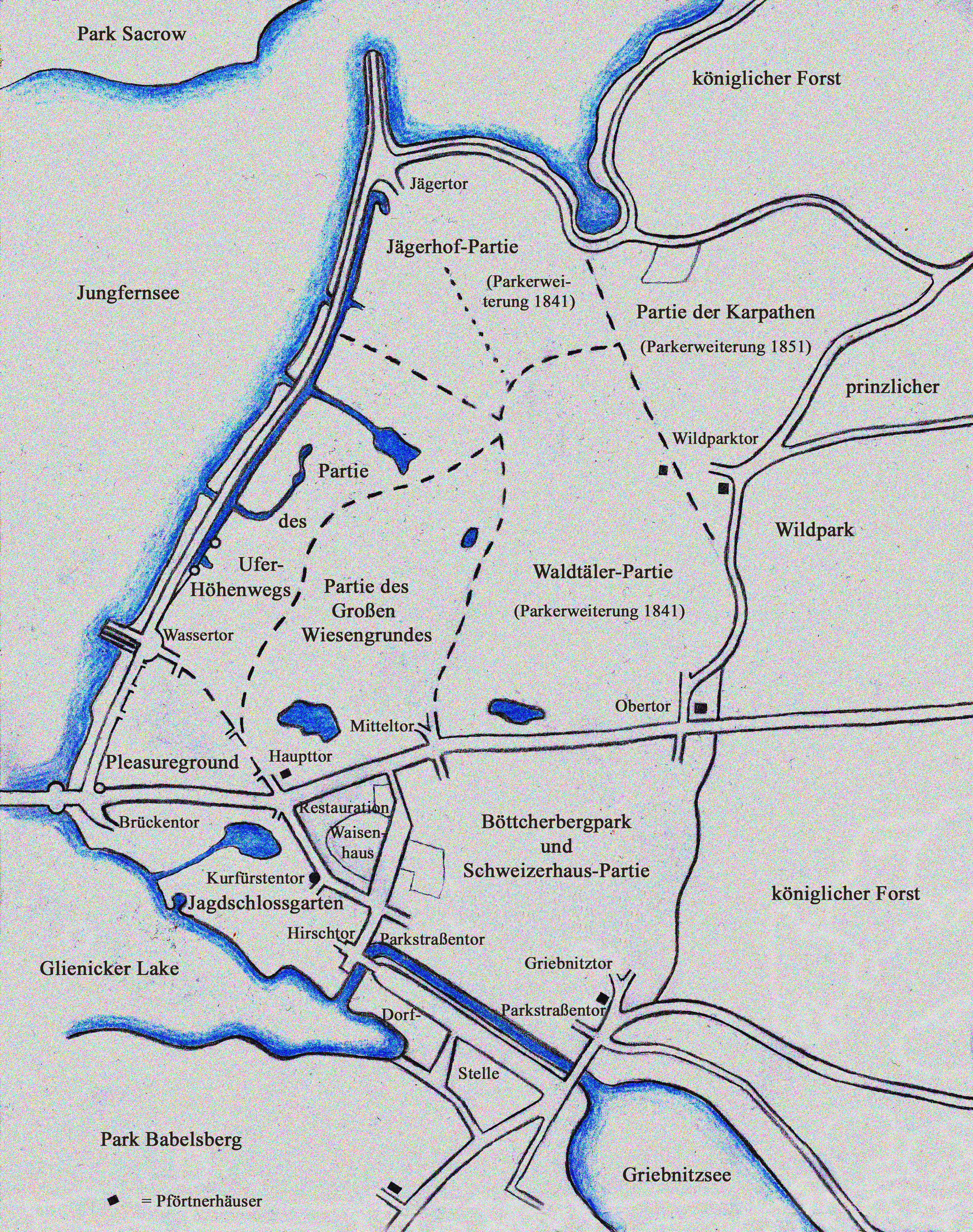 Übersicht über die Parkbereiche seit der letzten Erweiterung